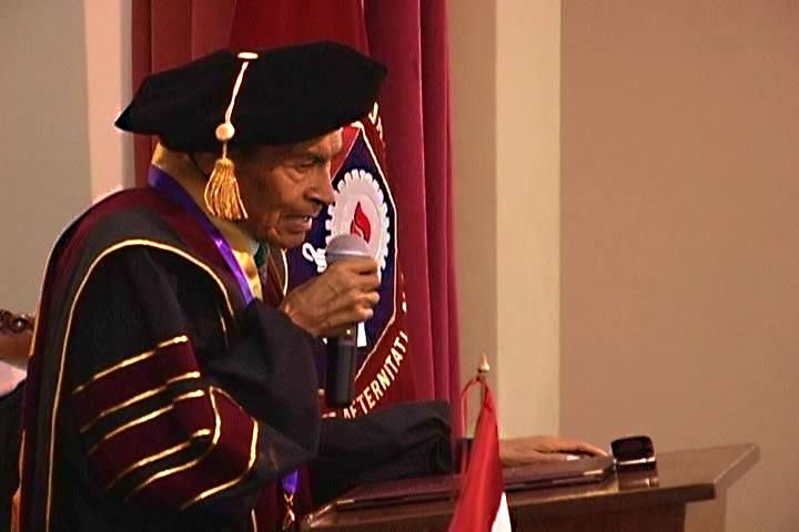 El Dr. Rubén Castillo Anchapuri dando el discurso de agradecimiento a las autoridades universitarias por otorgarle el grado de Doctor Honoris Causa, Universidad Peruana Unión, Lima.